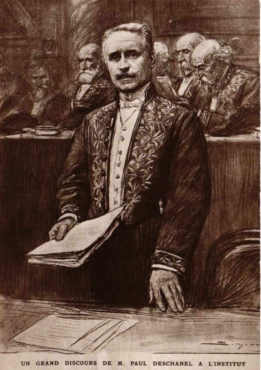 L'homme politique et écrivain Paul Deschanel prononçant un discours à l'Académie française.